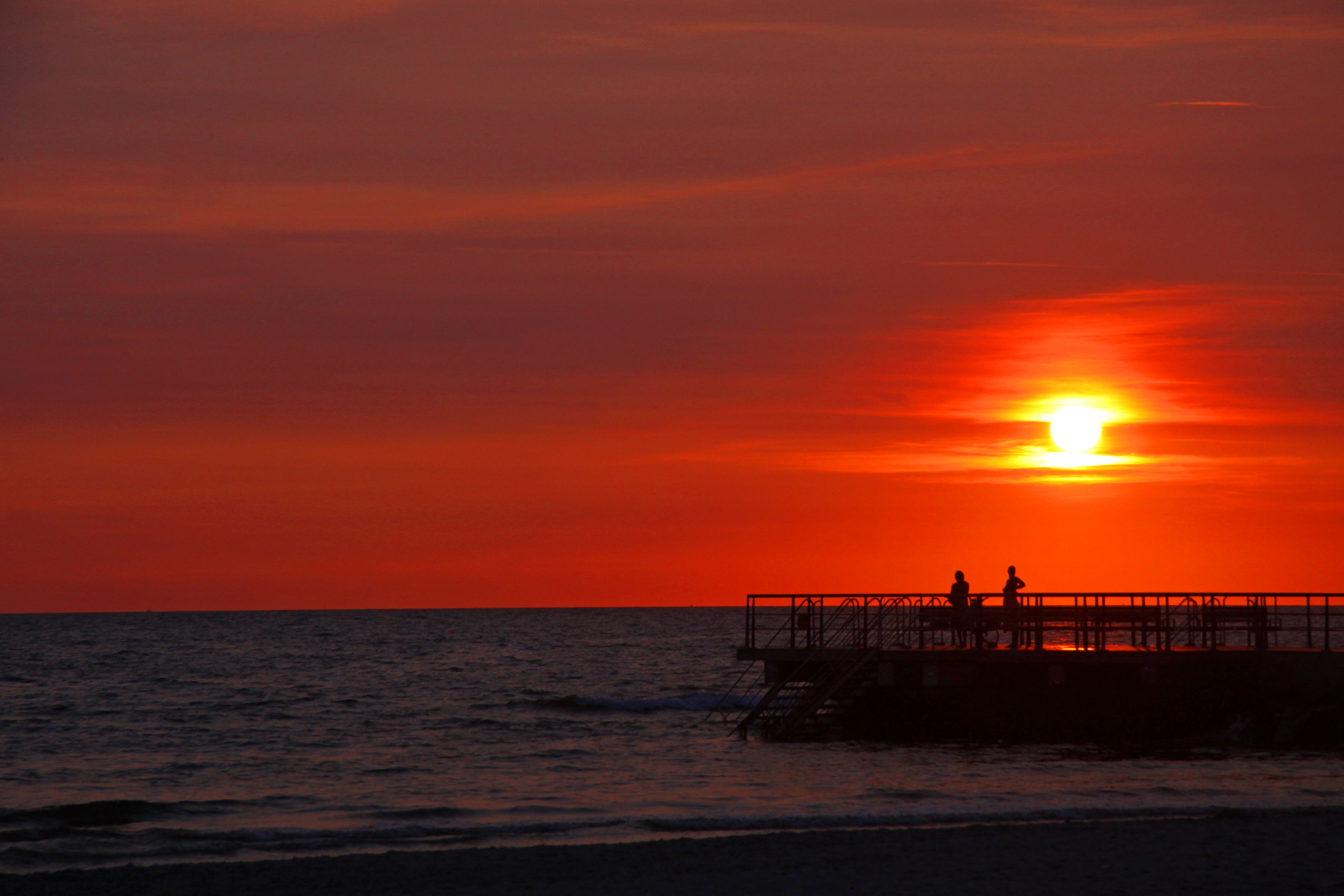 Helsingborg. Solnedgång över sundet.